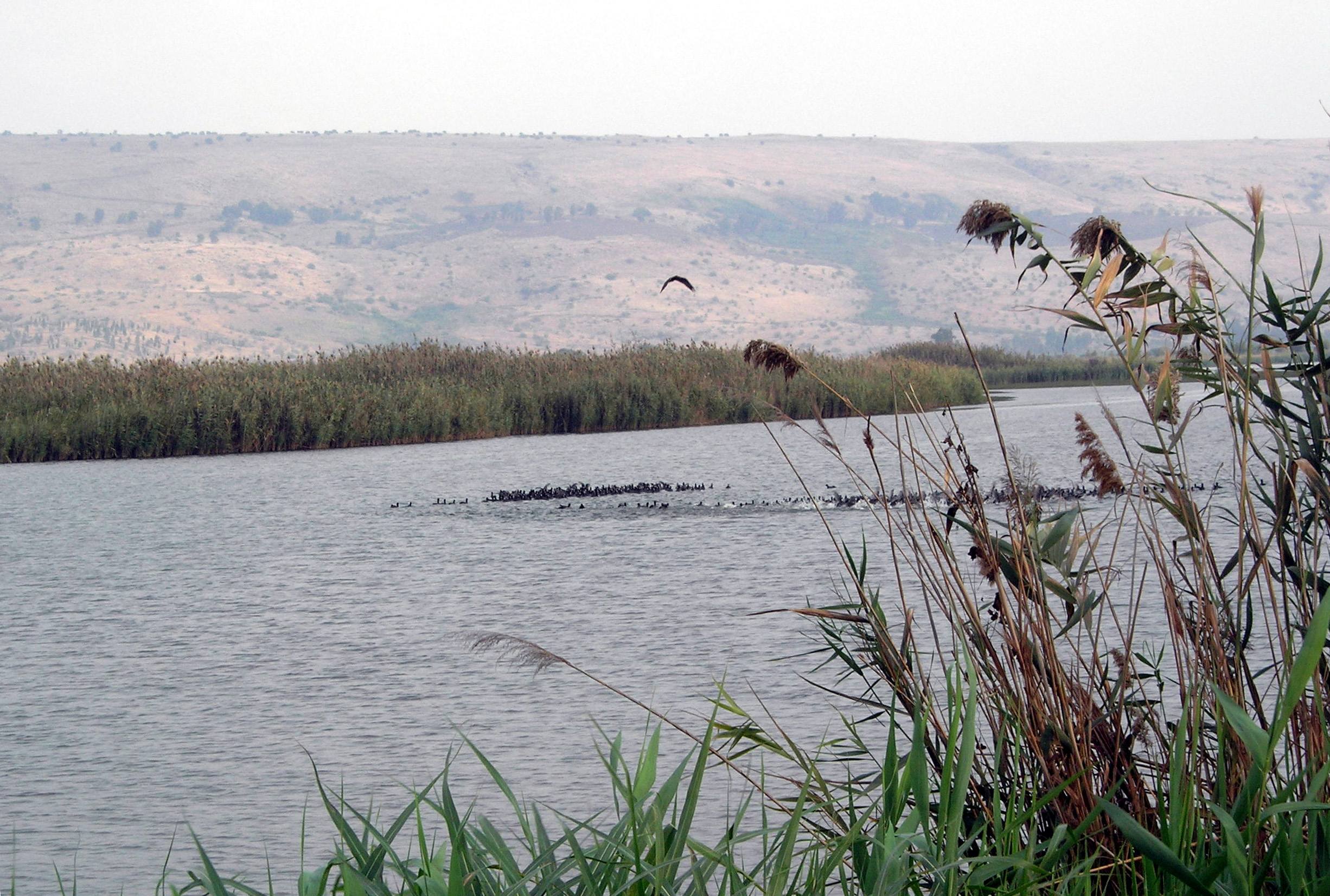 Description =Le lac Agmon dans la vallée Hula en Israel Source =Photo taken by Remi Jouan Date =Novembre 2006 Author =Remi Jouan